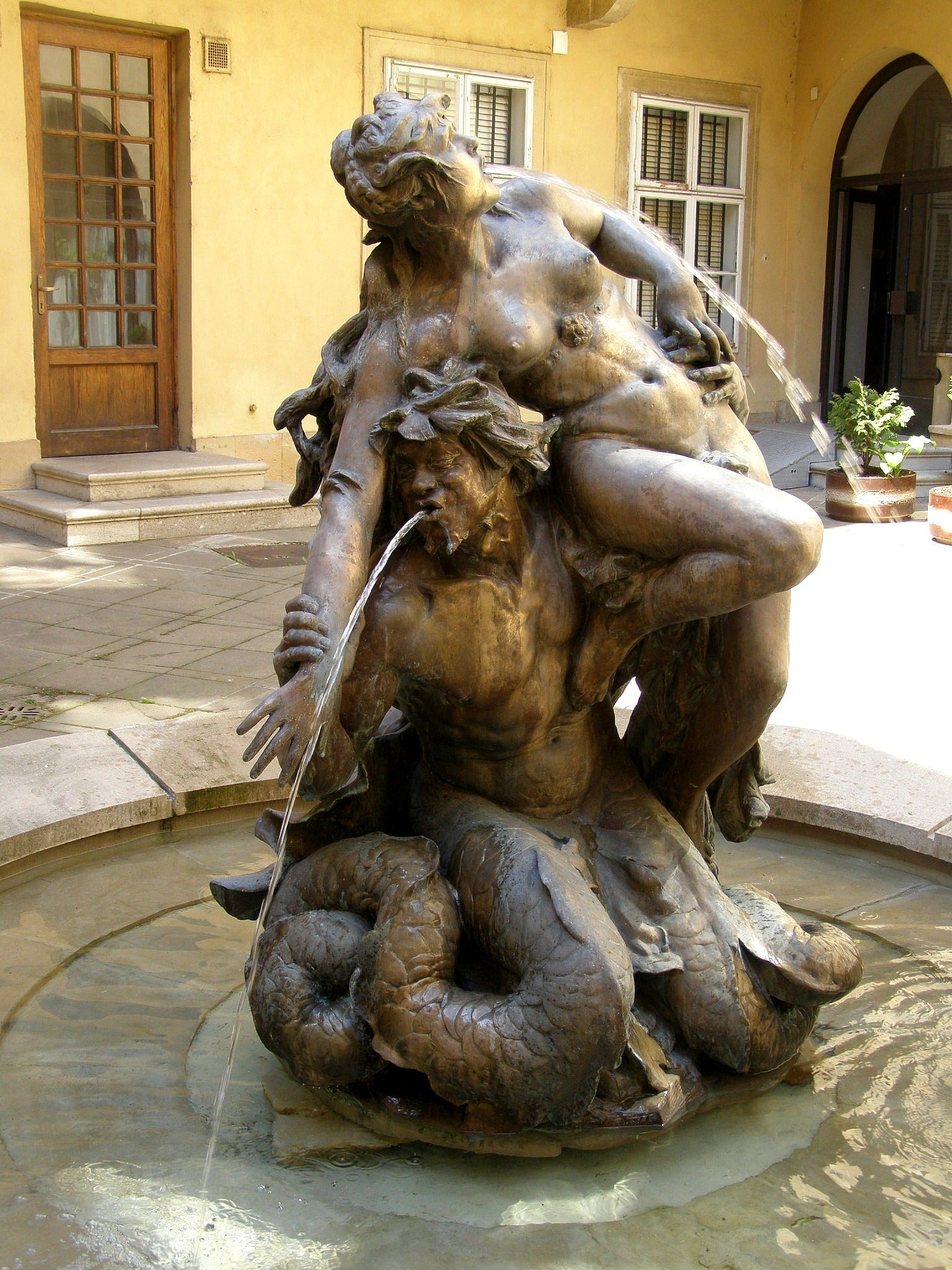 Fontána Tritón a Nymfa na nádvorí Mirbachovho paláca od Viktora Oskara Tilgnera